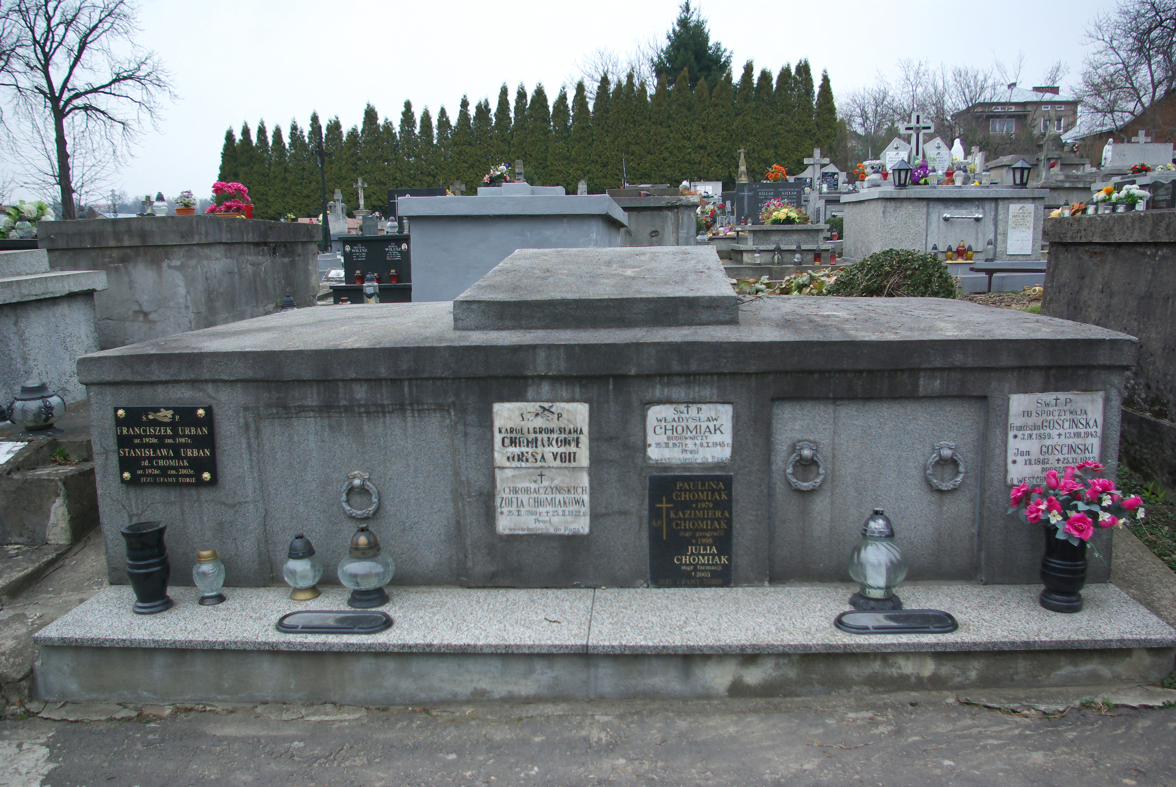 Grobowiec rodziny Chomiaków na Cmentarzu Centralnym w Sanoku